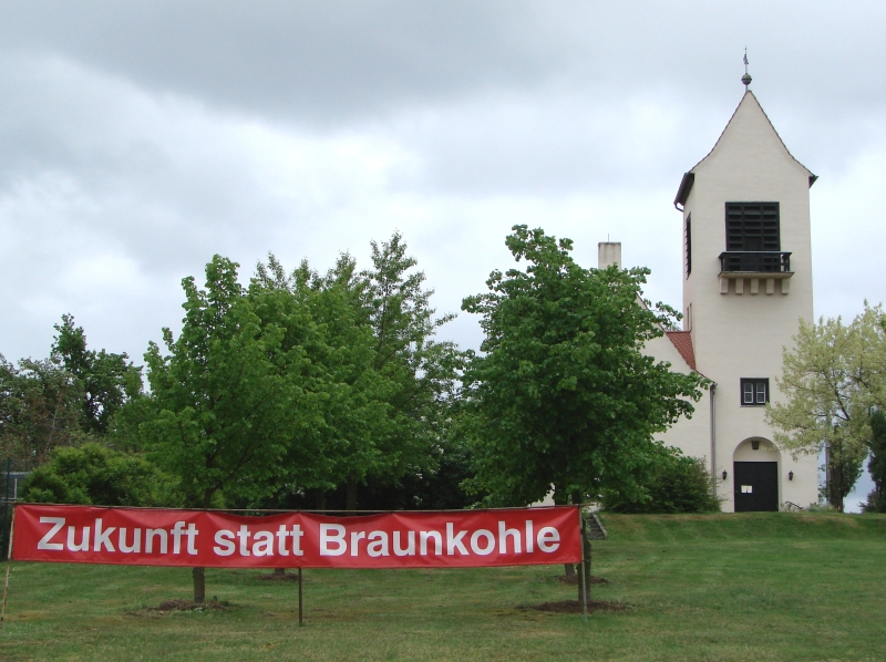 Die Kirche im Ortsteil Kerkwitz der Gemeinde Schenkendöbern steht unter Denkmalschutz. Sie wurde 1952 errichtet.